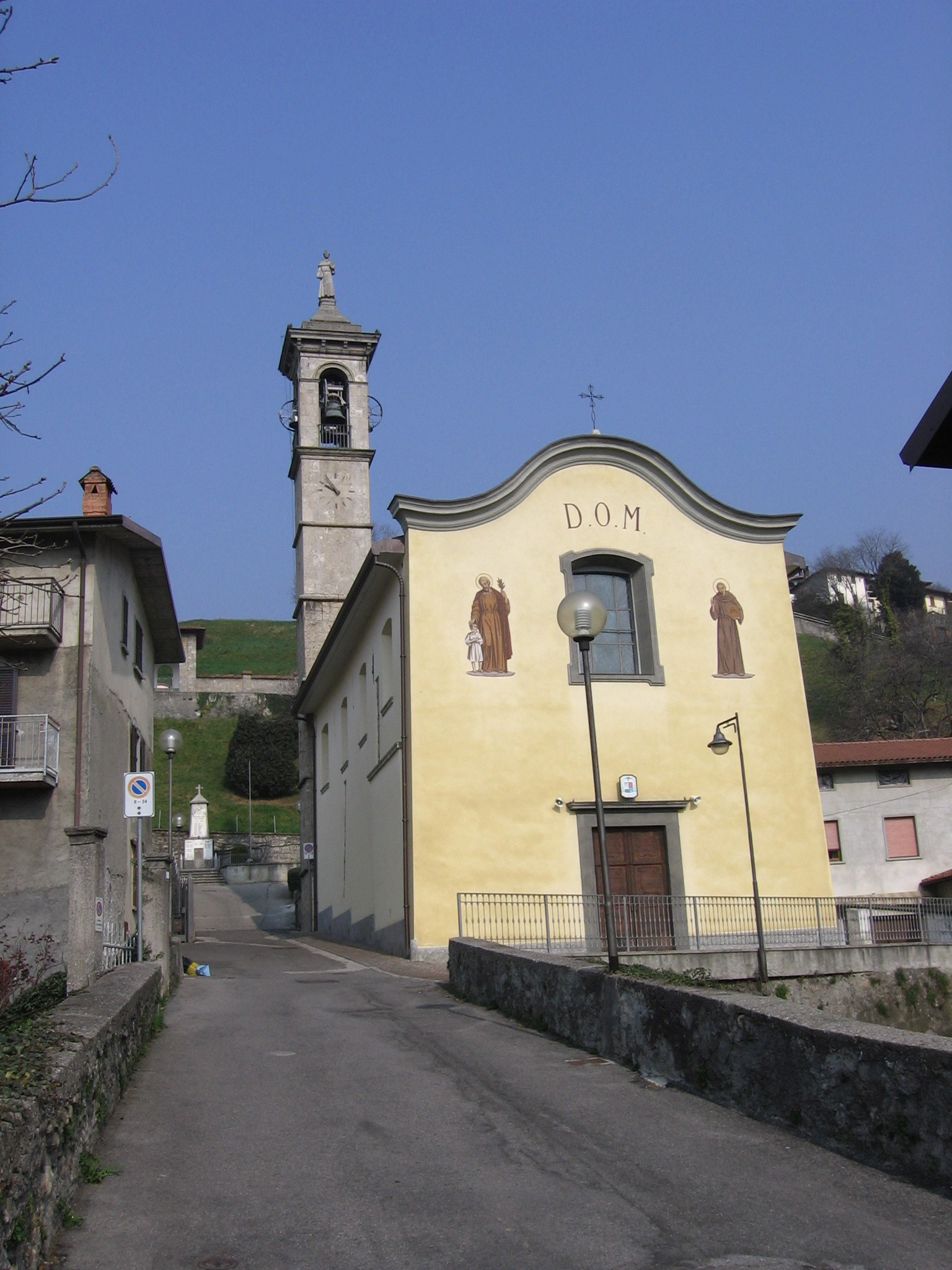 Vertova, Bergamo, Italia